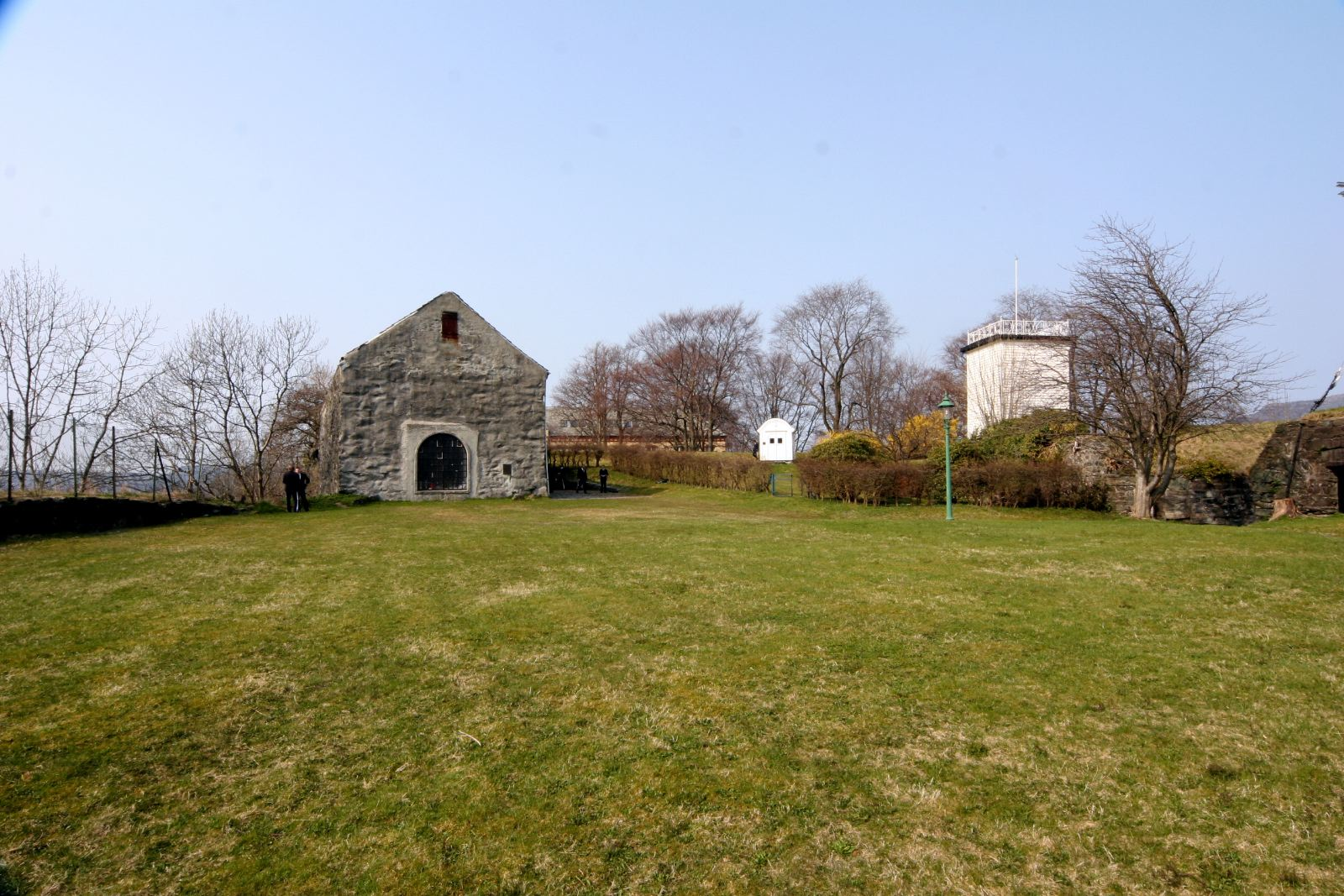 Fredriksberg fort, Bergen Photo: Nina Aldin Thune